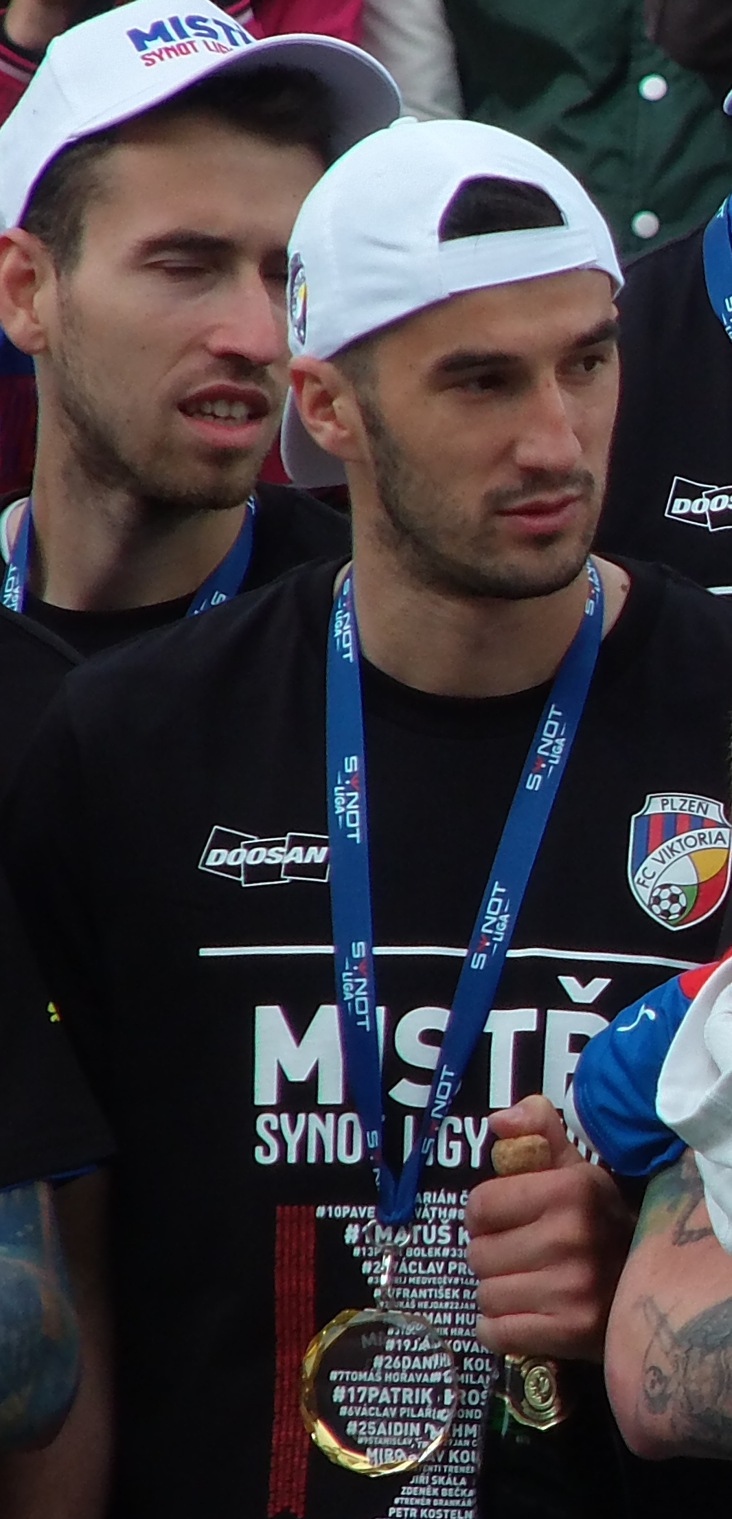 Aidin Mahmutovič - květen 2015